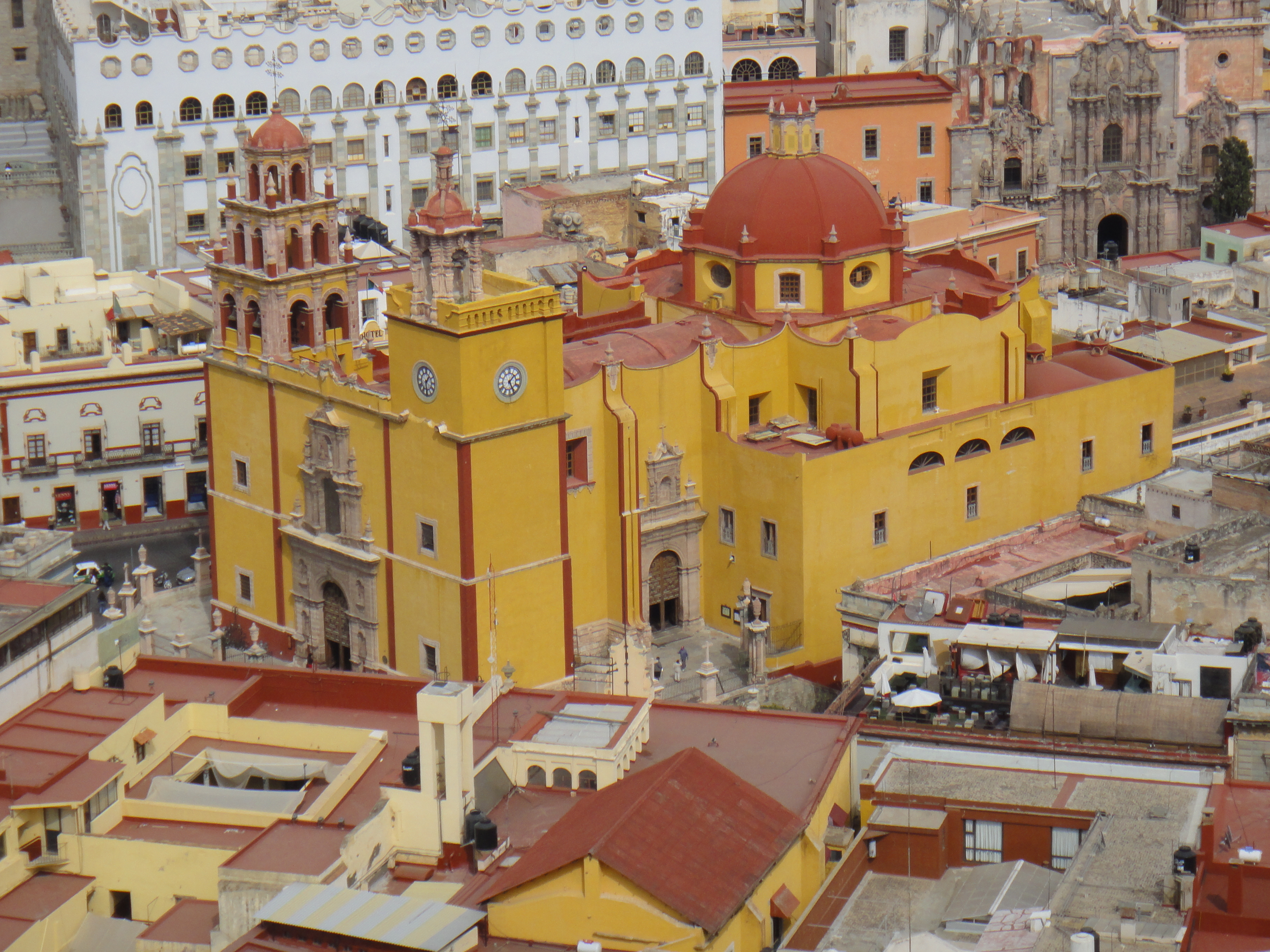 La catedral de la Basícila de León, edificada en honor a la Madre Santísima de la Luz de León